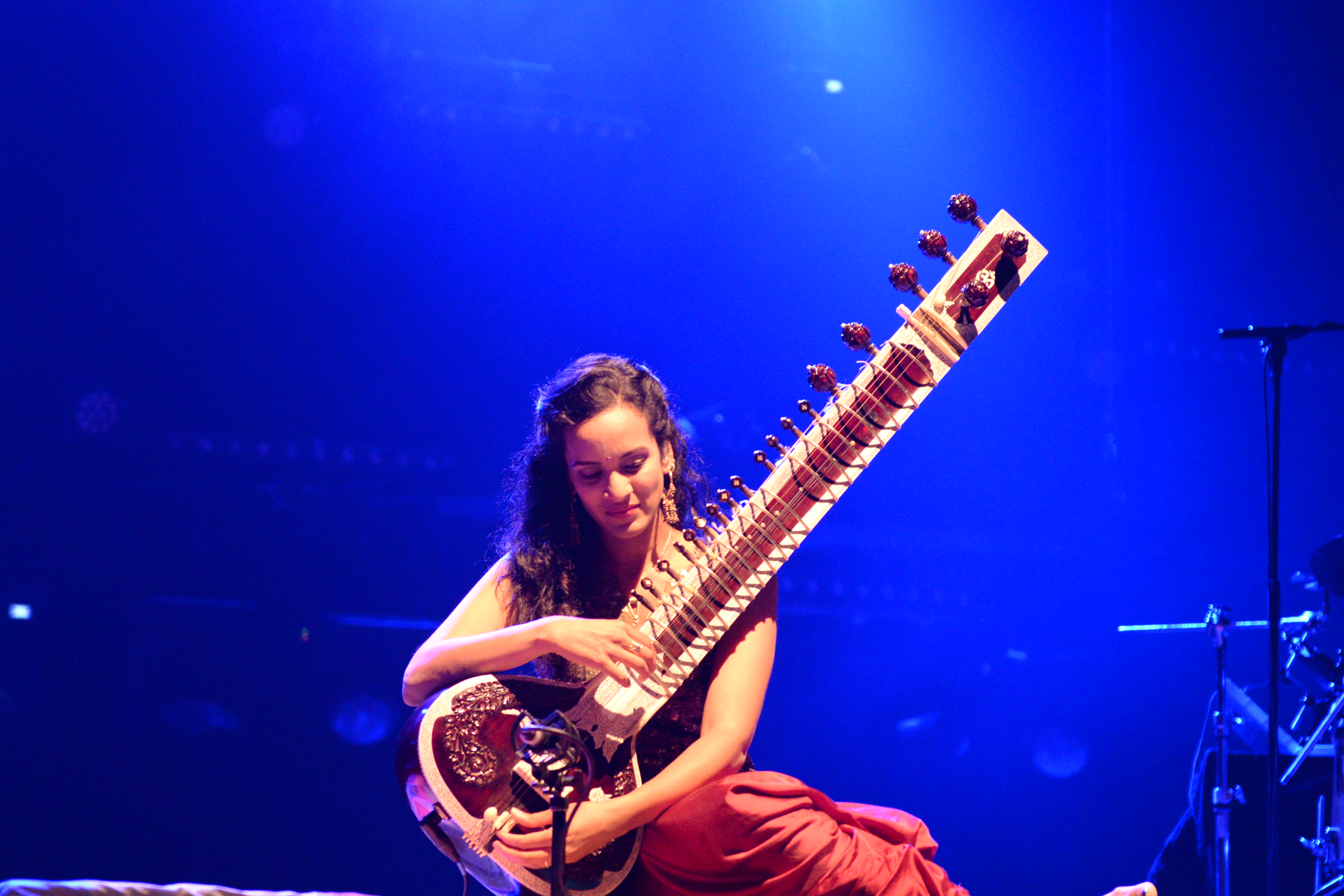 Concert de Anoushka Shankar du 6 août 2014 au Festival Interceltique de Lorient 2014